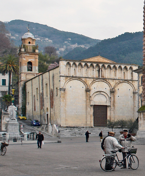 Pietrasanta, Domplatz